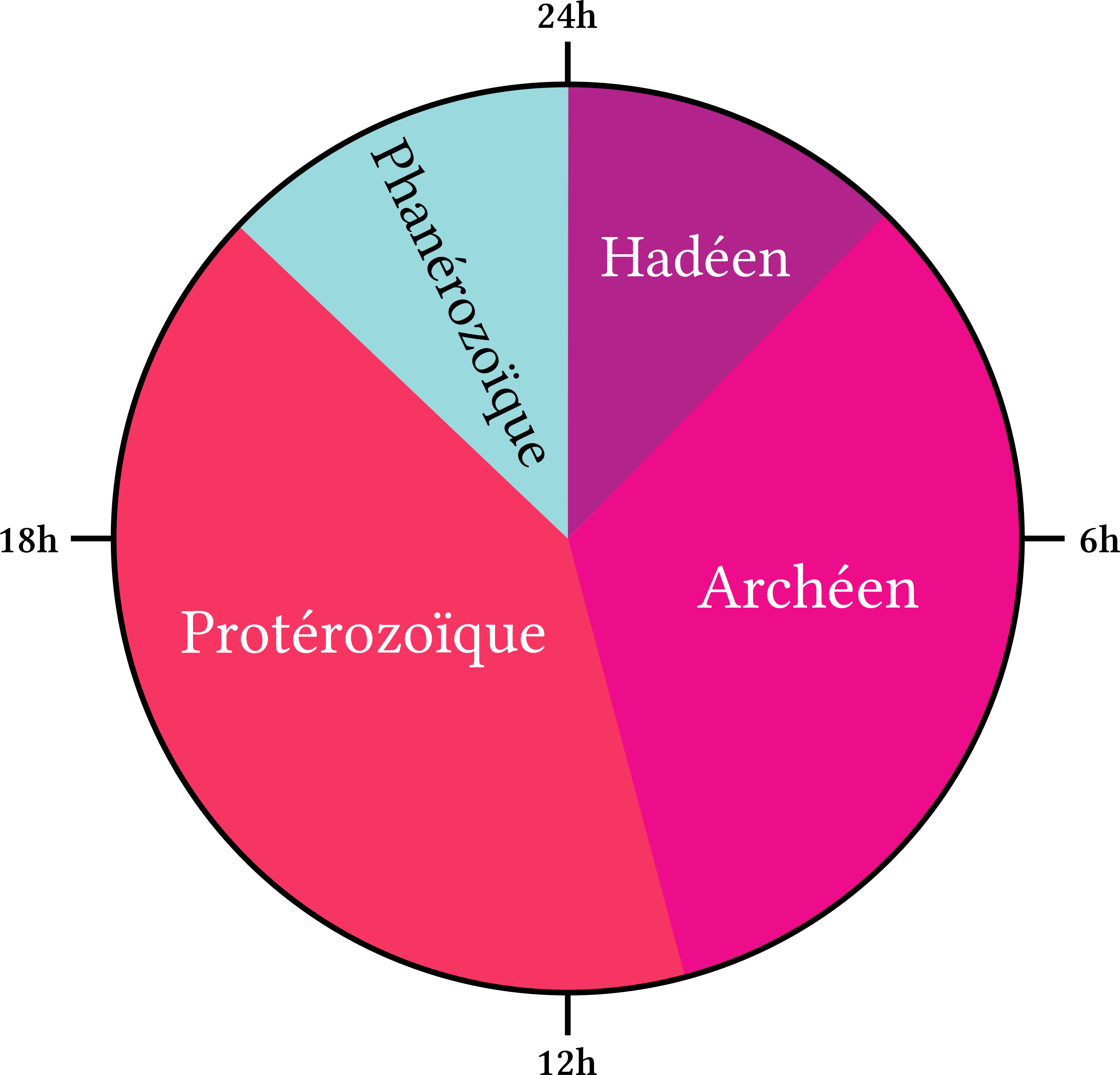 Diagramme représentant les 4 éons (Hadéen, Archéen, Protérozoïque et Phanérozoïque) de l'échelle des temps géologiques ramenés sur une section de 24h.